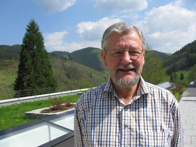 Foto di Uwe Storch